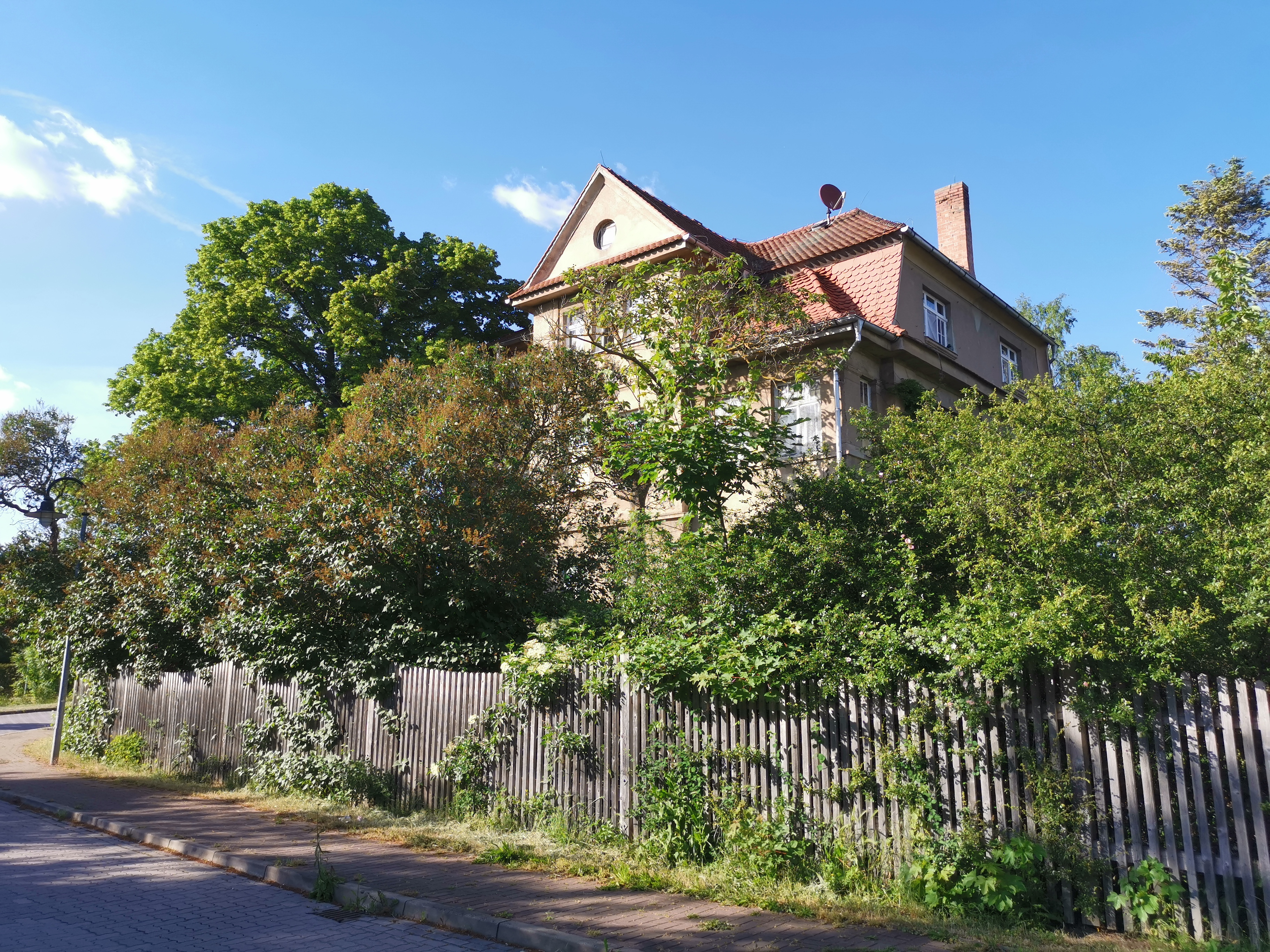 Villa Kreuzberg 1 in Allstedt